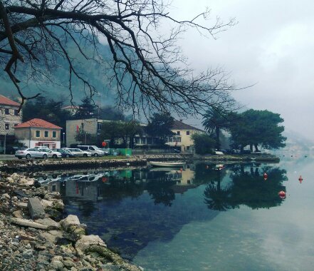 Karadağ'ın Kotor kentinde sahilden körfeze bakış.